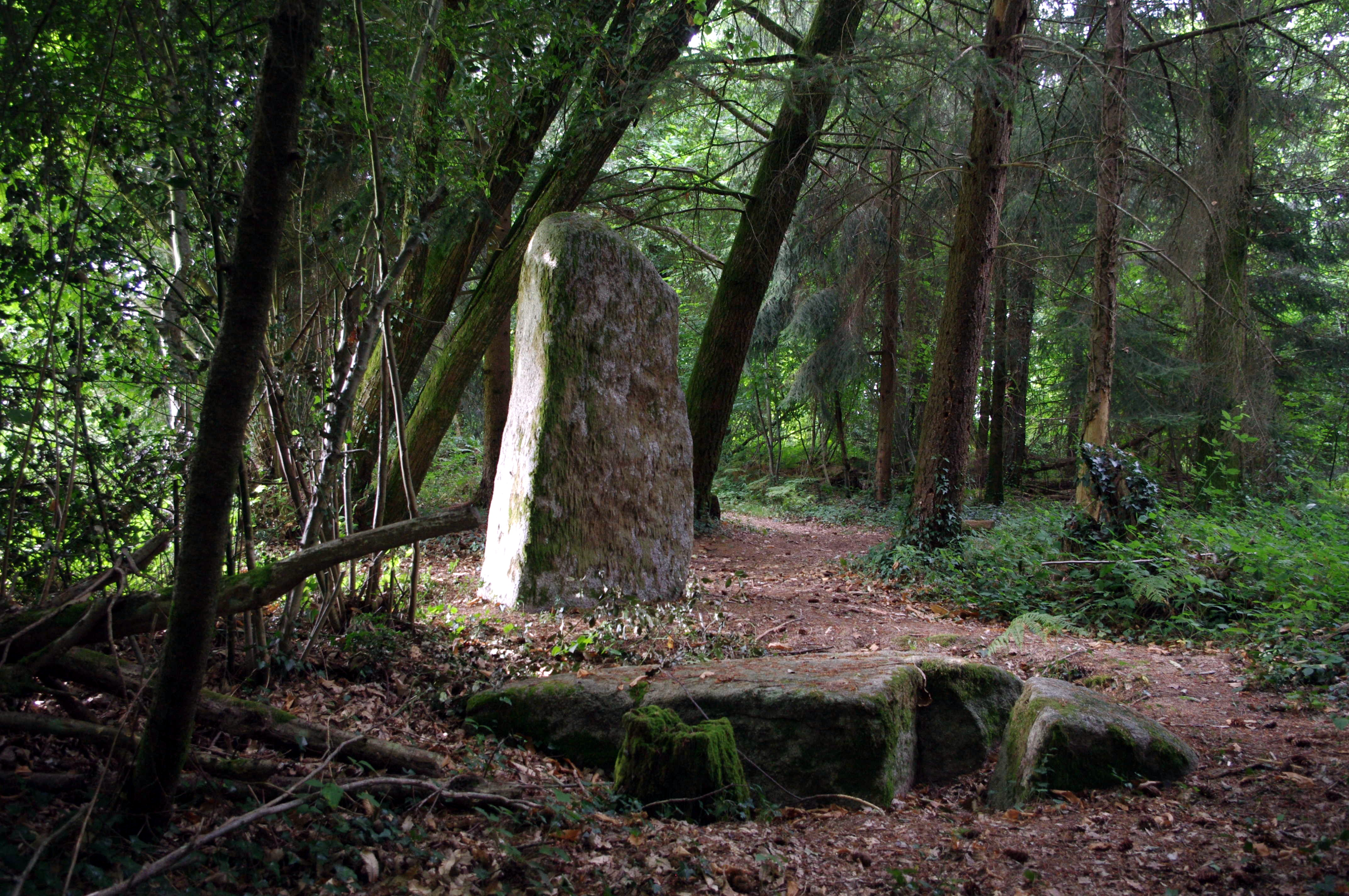 Menhir de Fixard sur la commune de Saint Estèphe, Dordogne, France.